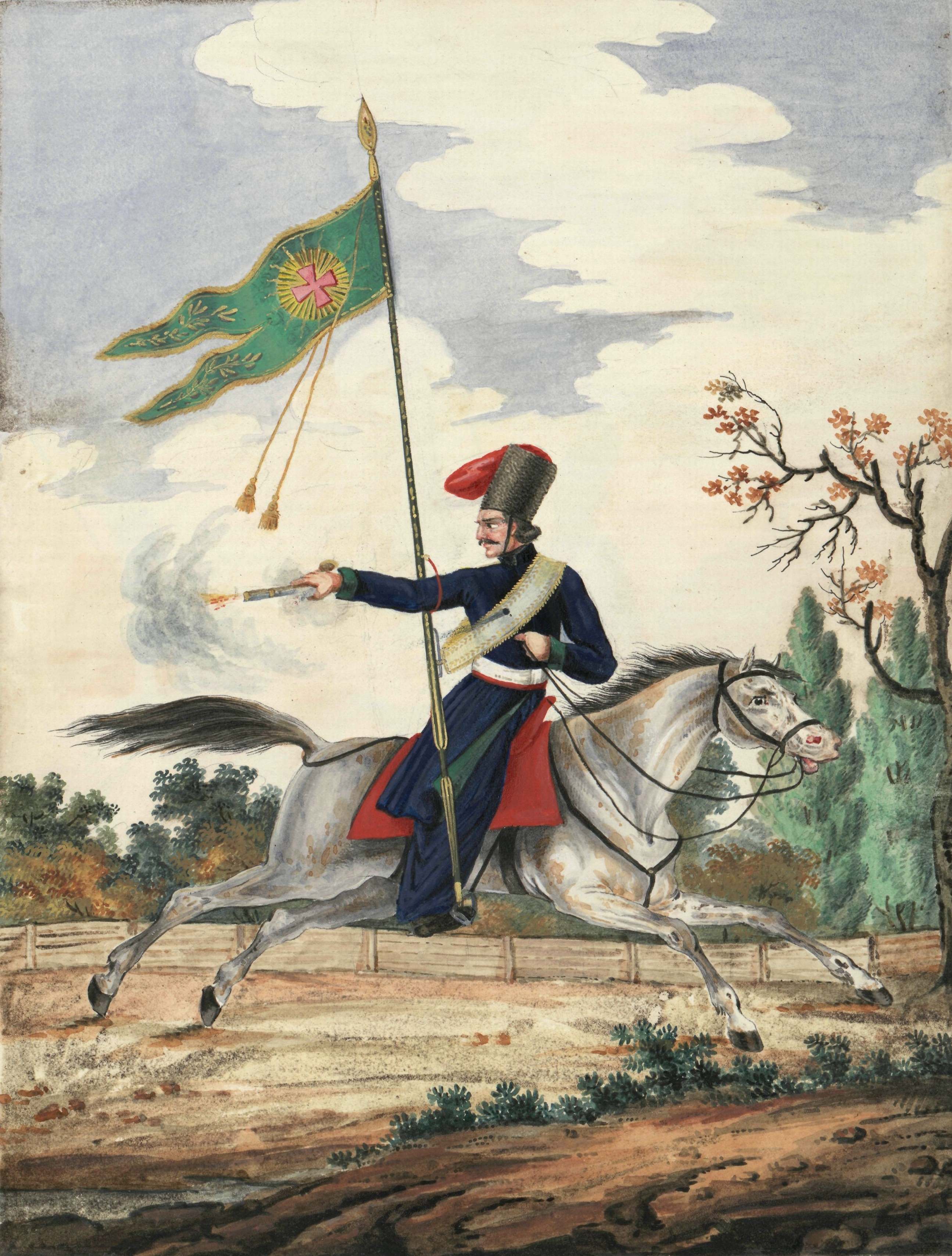 K. Знаменщик Чугуевских Казаков. 1772 года.